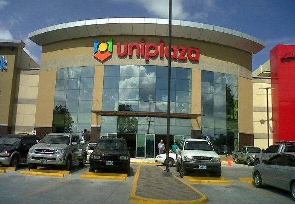 Fachada Mall Uniplaza-SRC — Copán Department.